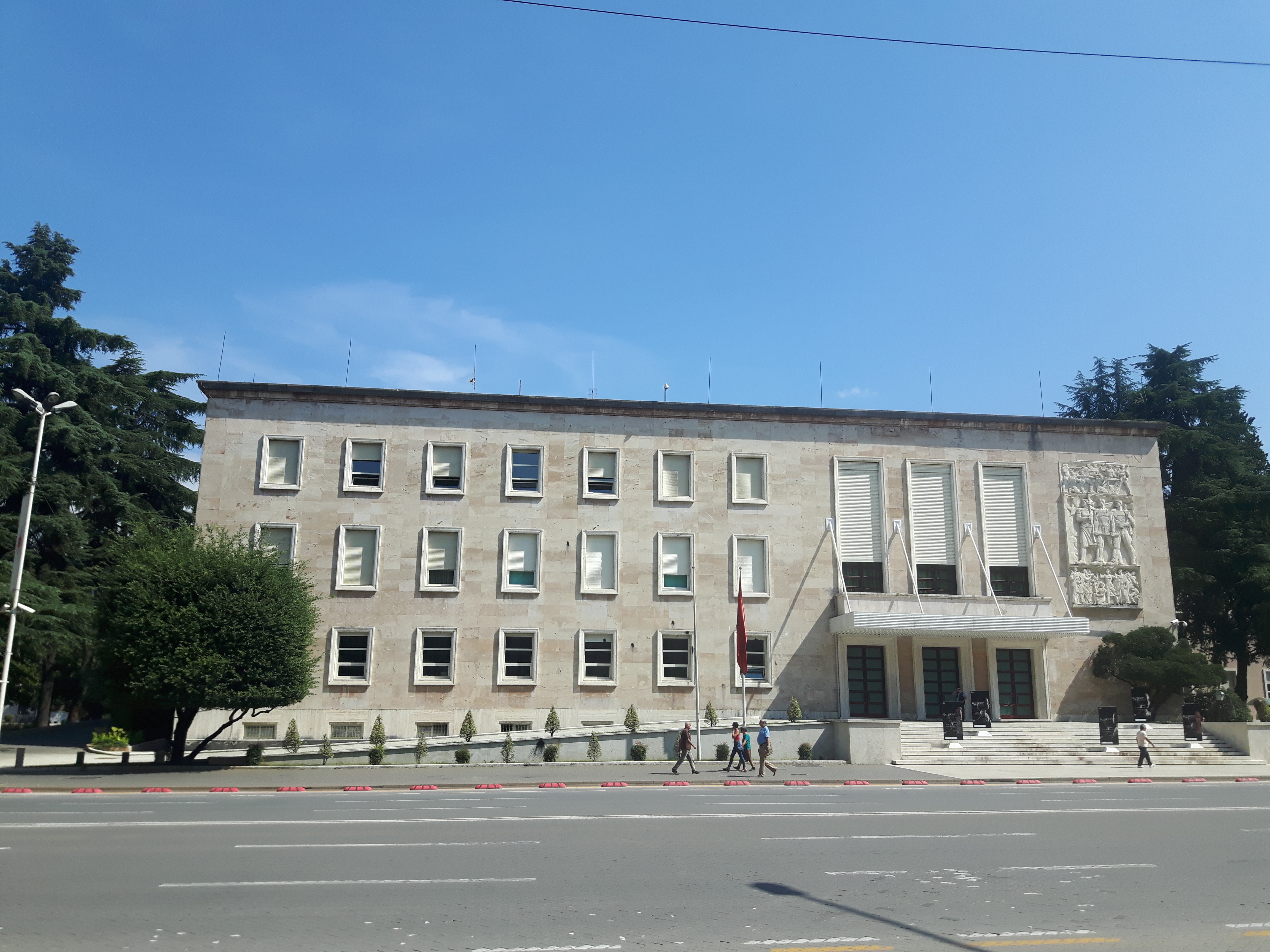 Kryeministria në bulevardin "Dëshmorët e Kombit"